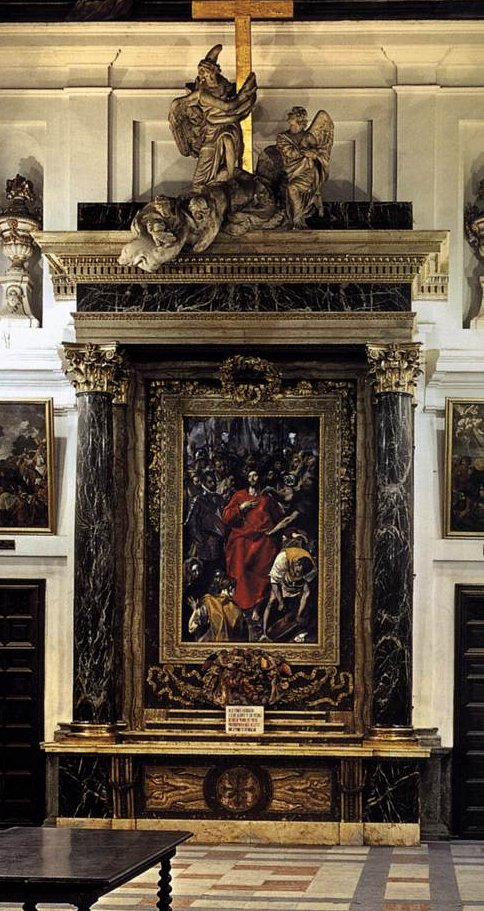 Sacristía de la Catedral de Toledo con el cuadro El expolio del Greco al fondo